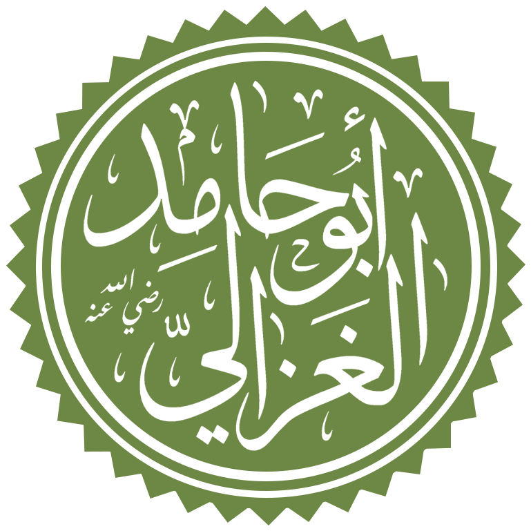 تخطيط لاسم الإمام أبي حامد الغزالي